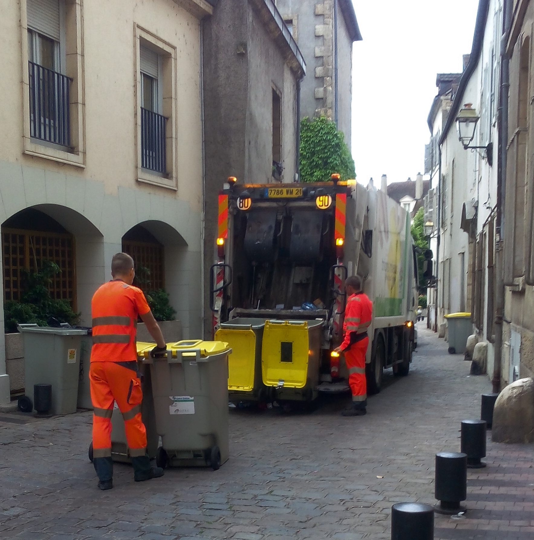 Éboueurs à Dijon